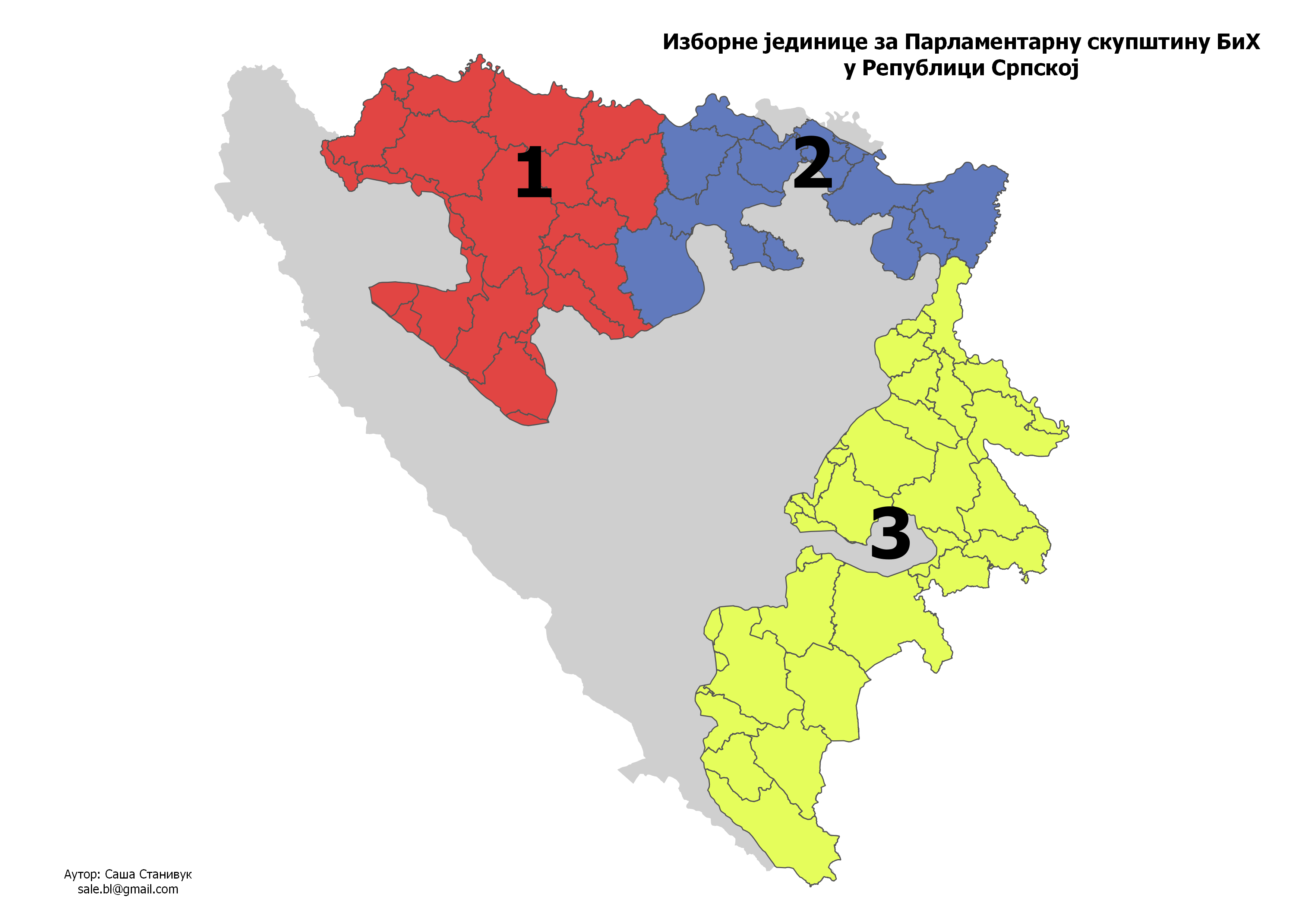 Српски (ћирилица): Изборне јединице за Парламентарну скупштину БиХ у Републици Српској